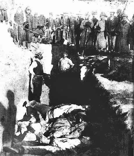 Indianer Massengrab am Wounded Knee Bild ist aus dem Jahr 1891 Public-Domain